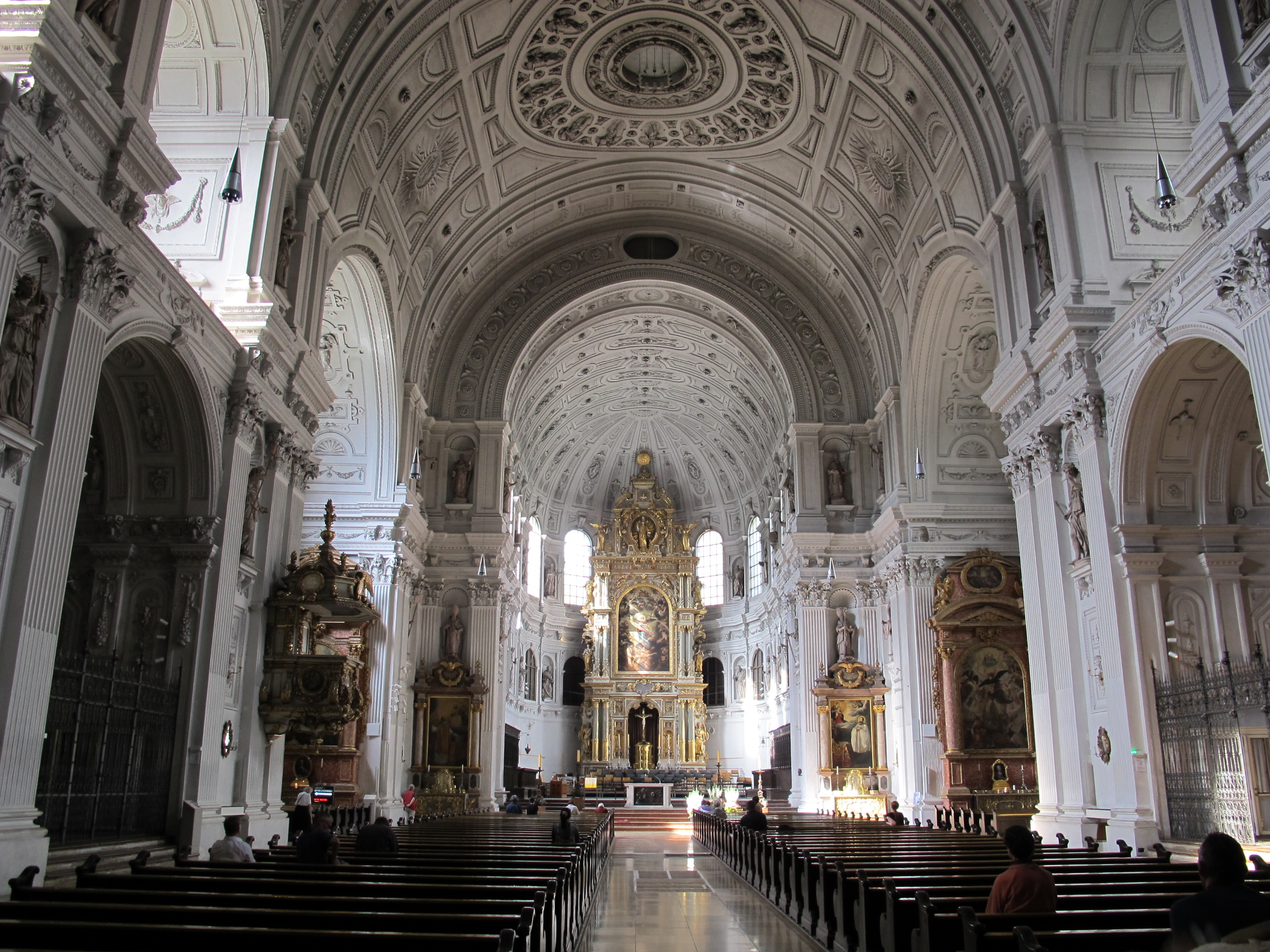 St. Michael (München), interior